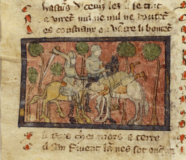 Assassinat de Chilpéric Ier. Français 1630, fol. 182v. Roman de renart le contrefait. XIVème siècle (après 1314). France, Nord.